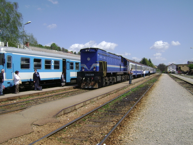 Željeznički kolodvor Zabok